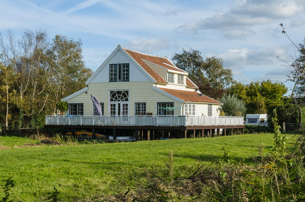 Voormalig atelier en voormalige jeugdherberg De Karekiet, Kortenhoefse dijk, Kortenhoef, Wijdemeren, Noord Holland, Nederland.